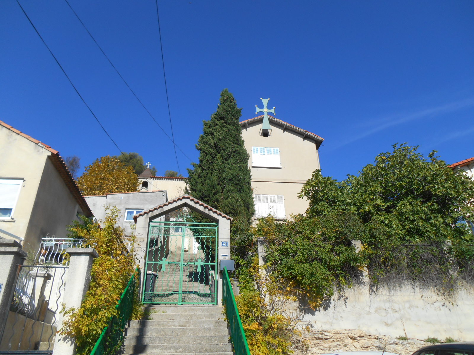 église de Verduron